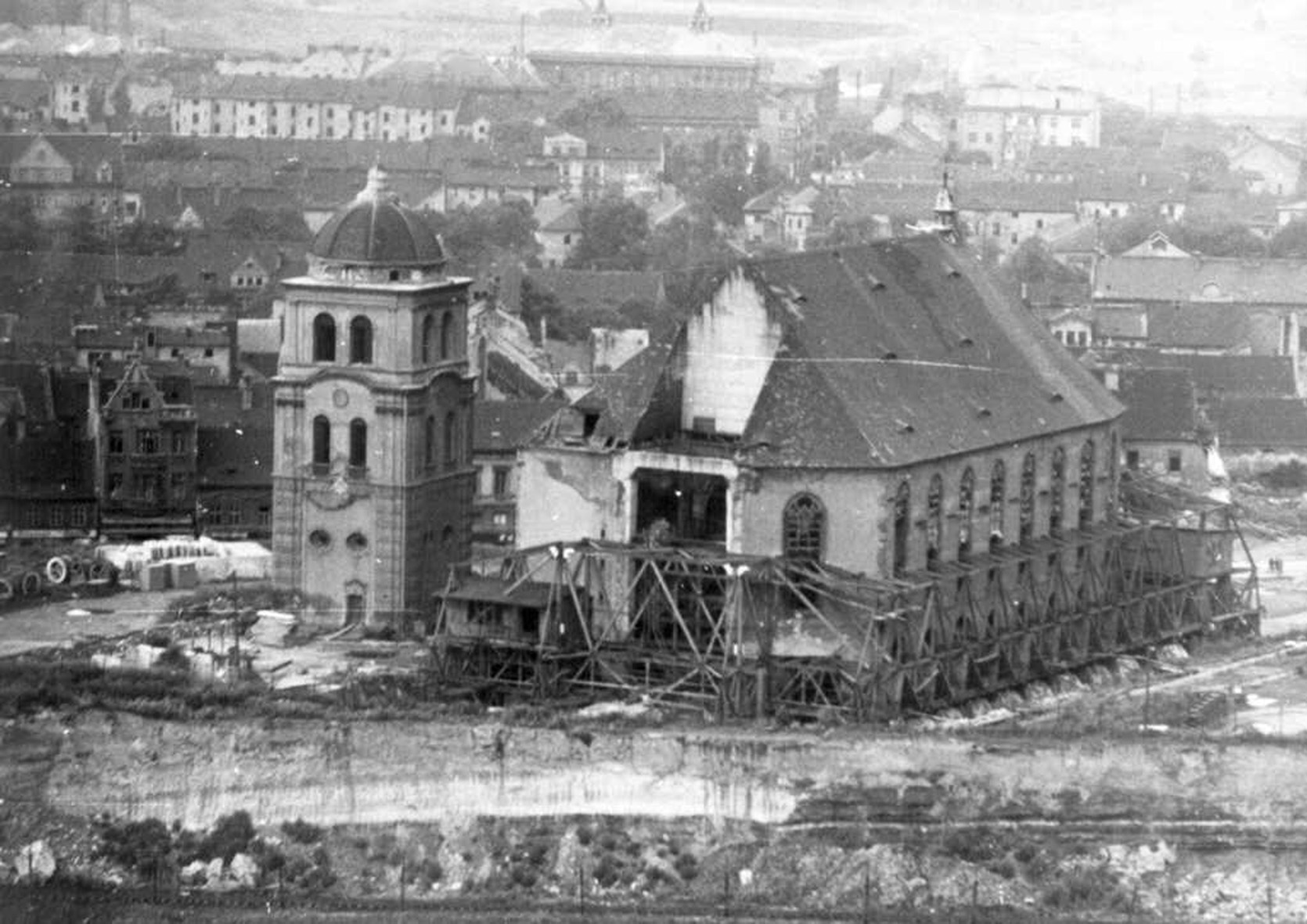 Dekanalkirche in Most (Brüx) vor dem Transport, links der ehem. Glockenturm.